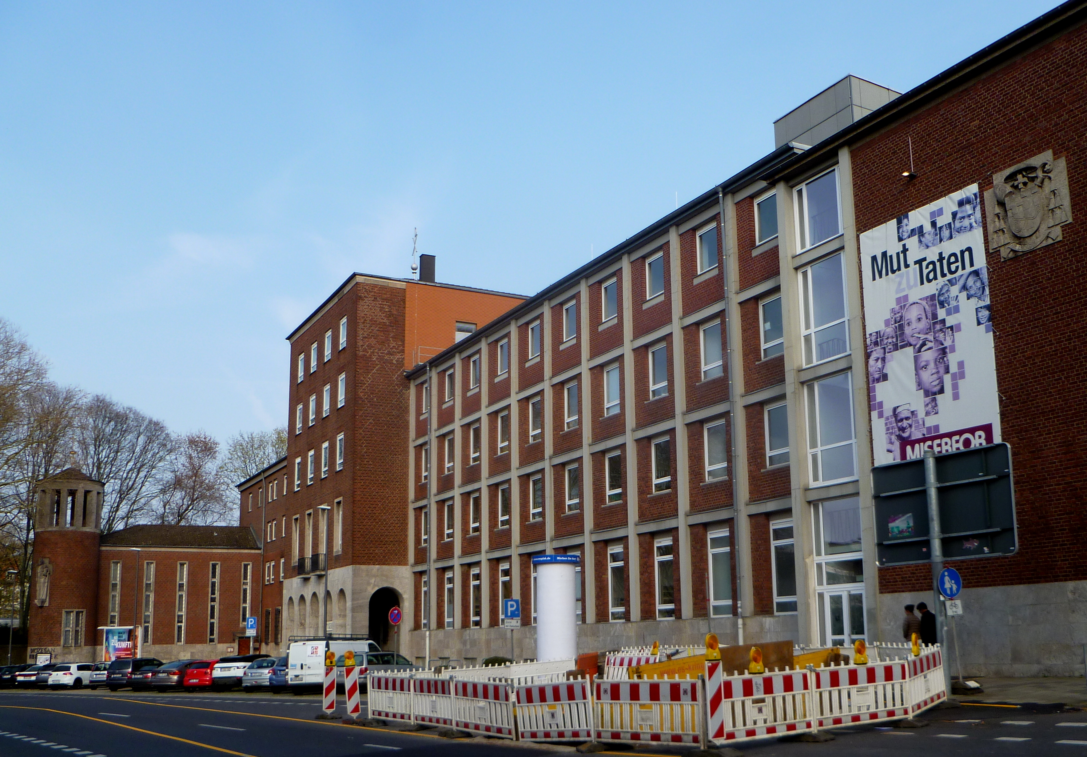 MISEREOR-Hauptgebäude in Aachen